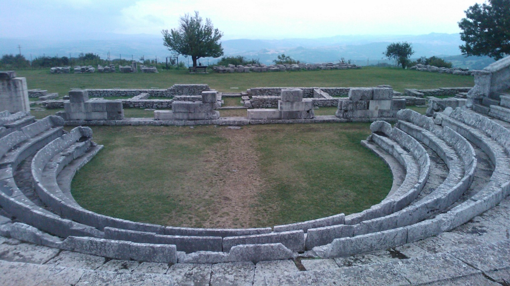 Pietraabbondante Amphitheater der Samniter